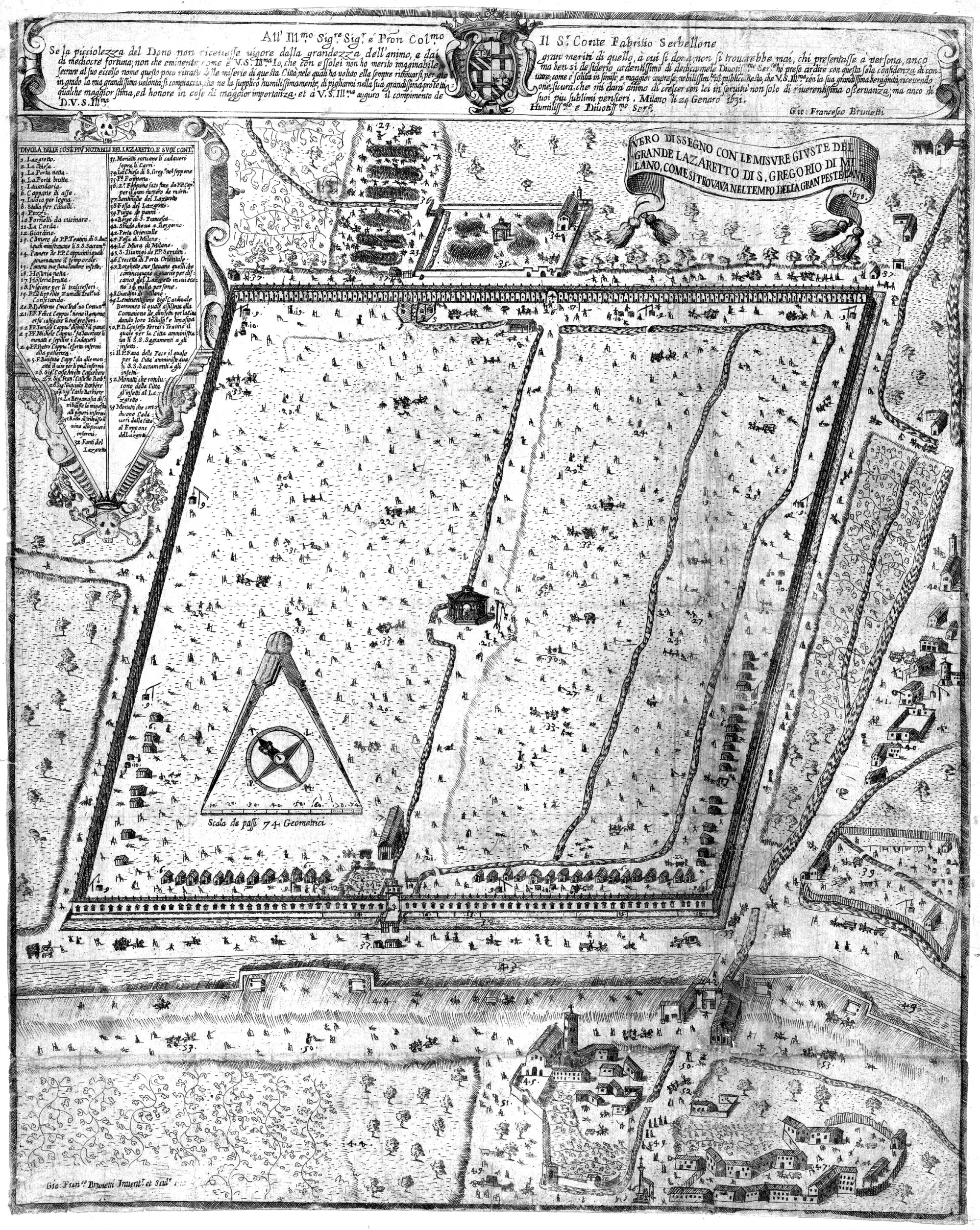 Vero dissegno con le misure giuste del grande lazaretto di S. Gregorio di Milano come si trovava nel tempo della gran peste l'anno 1630